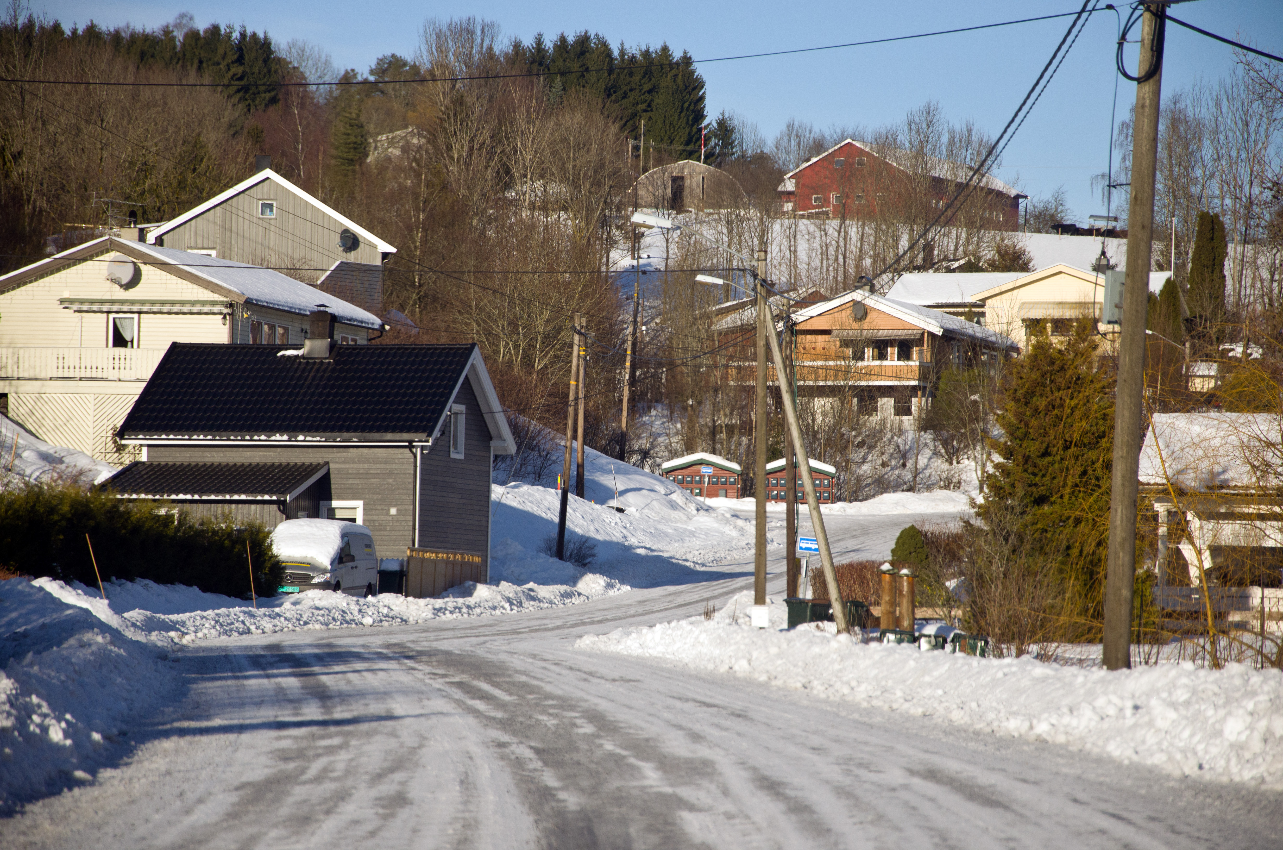 Fylkesvei 950 Klevjerveien i Vestfold